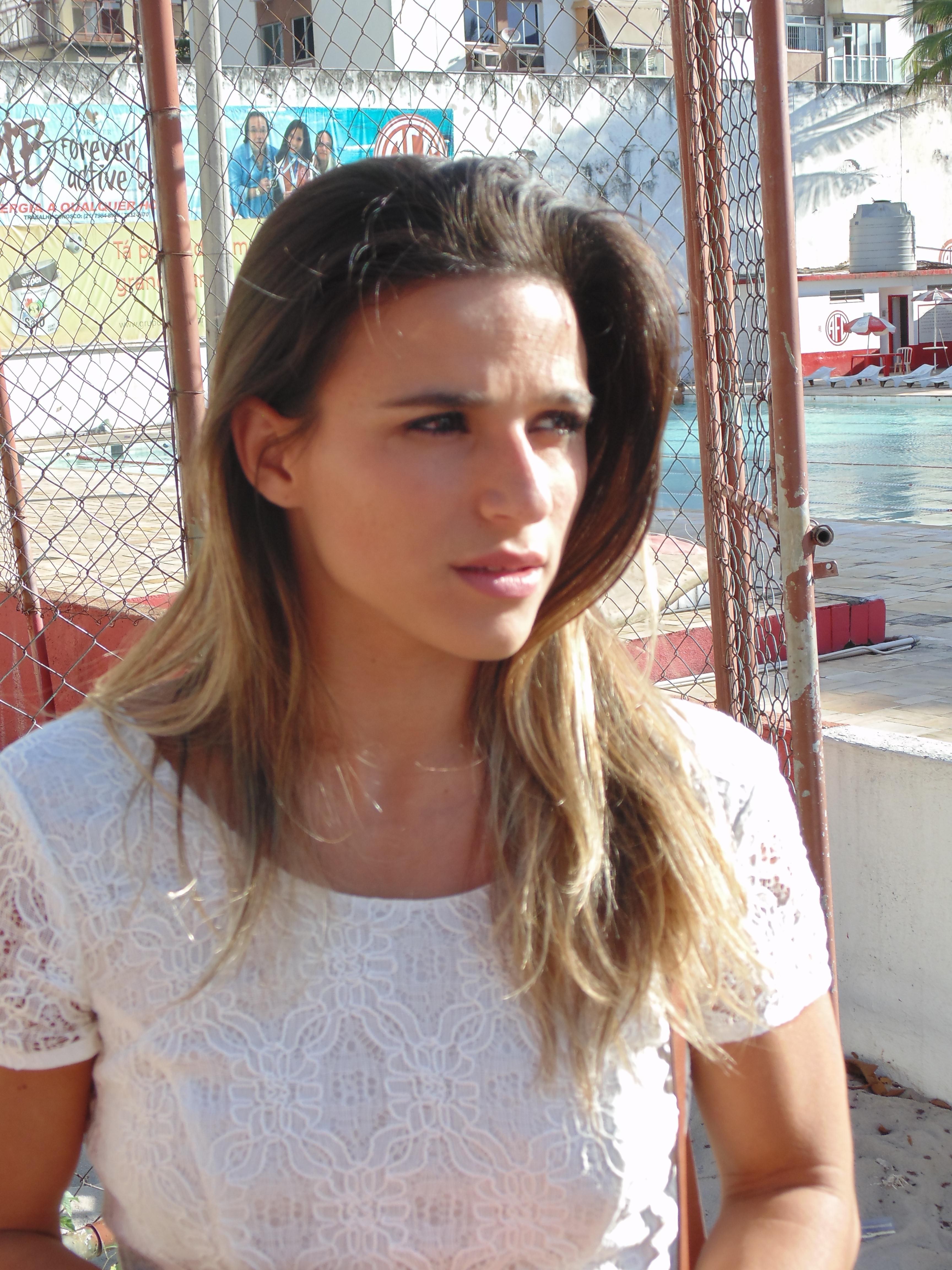 Jade Barbosa, ginasta brasileira olímpica.